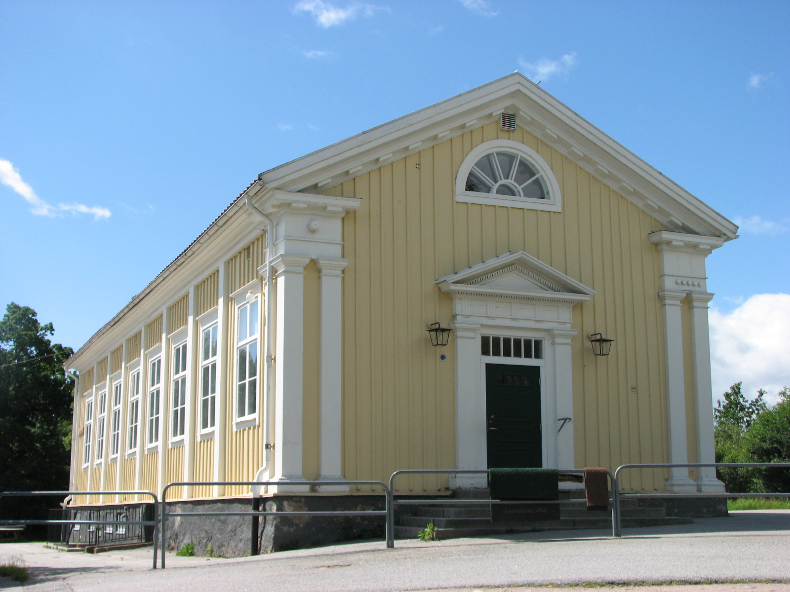 Johannishusskolan